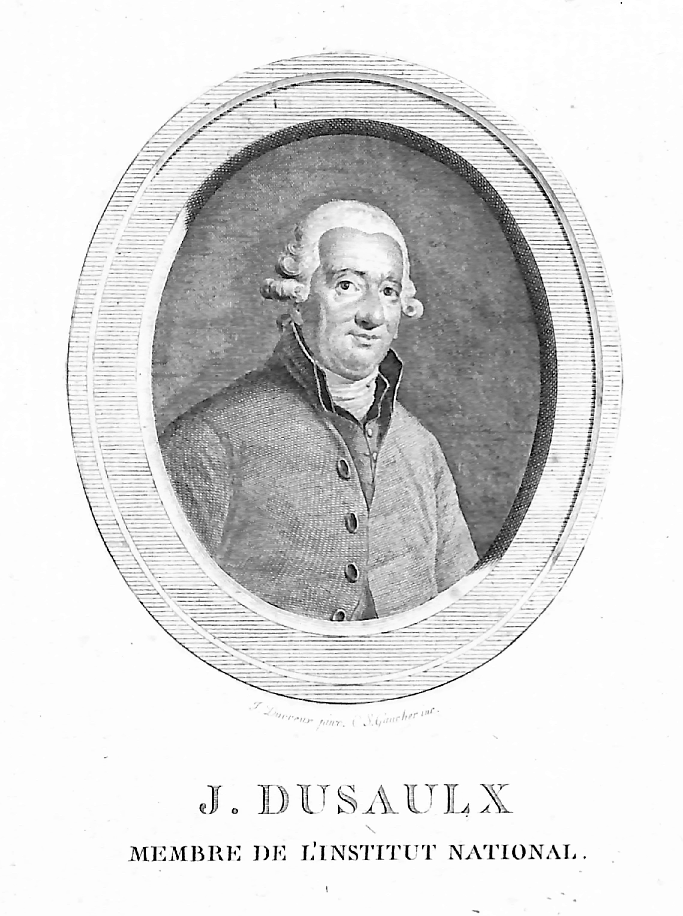 portrait de Jean Dussaulx ou Dusaulx par Gaucher d'après Ducreux